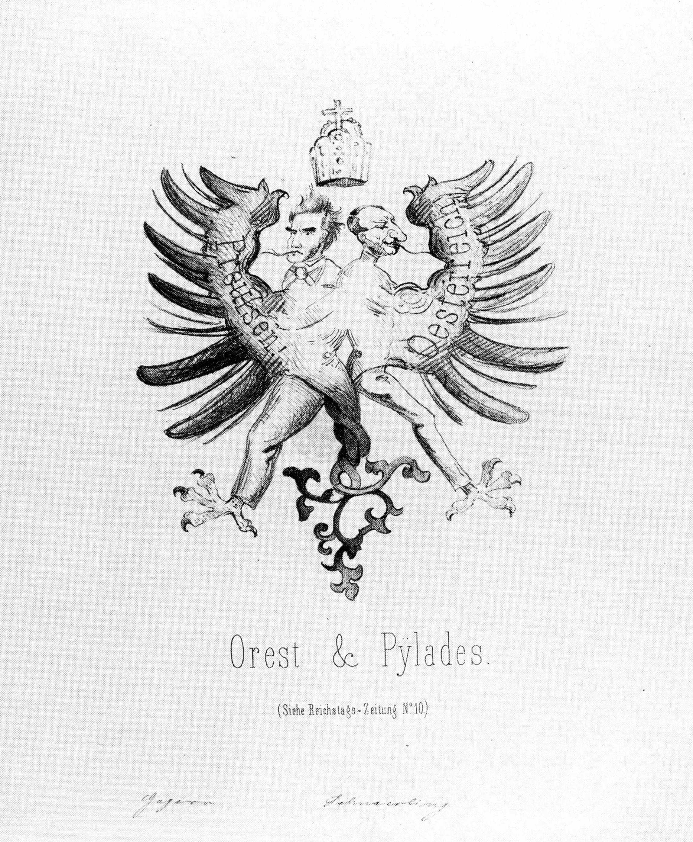 Lithographie von Ernst Schlack. “Orest und Pylades”, 1848. Heinrich von Gagern und Anton von Schmerling.